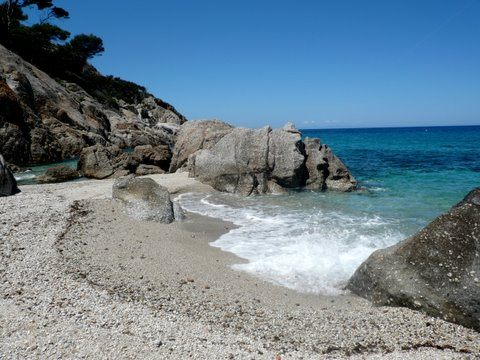 Isola di Montecristo 2011 - autore: Ambrogio Volpi - la spiaggia